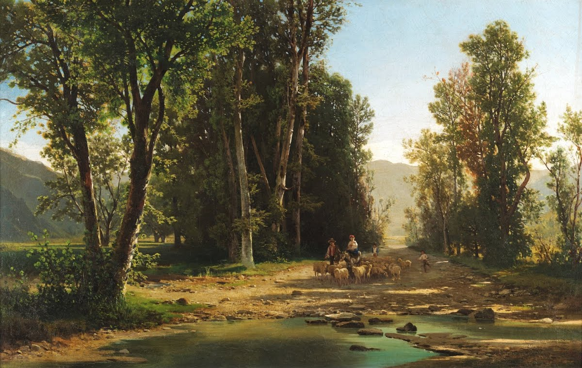 "Paesaggio con pastori", olio su tela, 64.7 x 74.9 cm., firmato, coll, privata